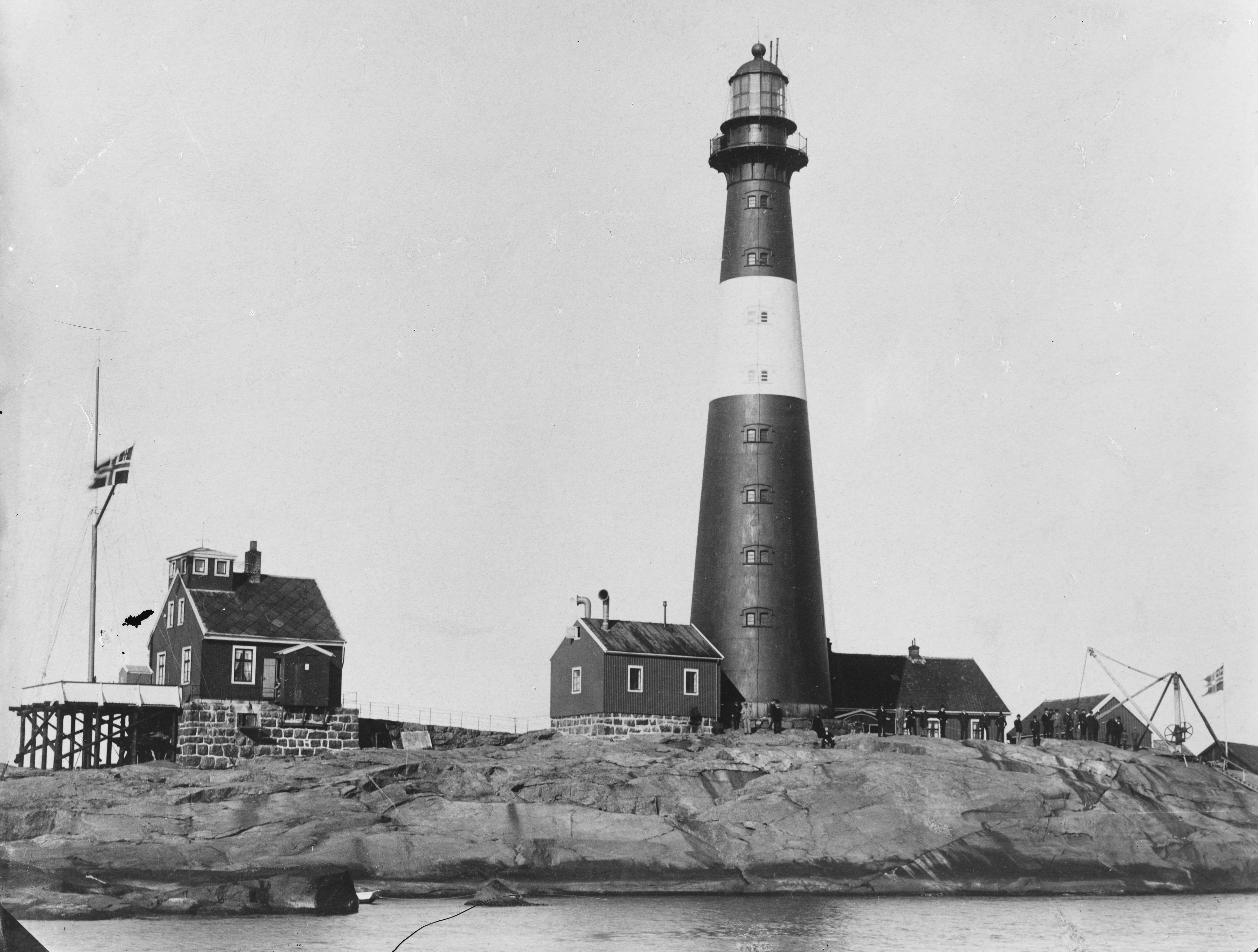 Påskrift konvolutt: B-86 Tjøme Ferder fyr [Riksantikvaren] Sted: Lille Færder,Tristein Kommune: Tjøme Fylke: Vestfold Tagger: repro: fyrstasjon Færder fyr